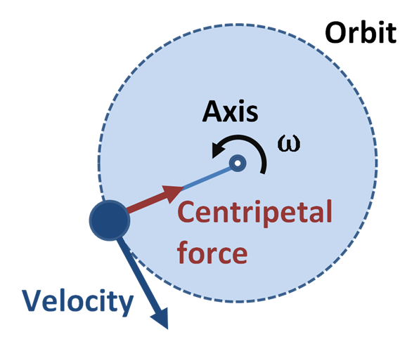 Centripetal force